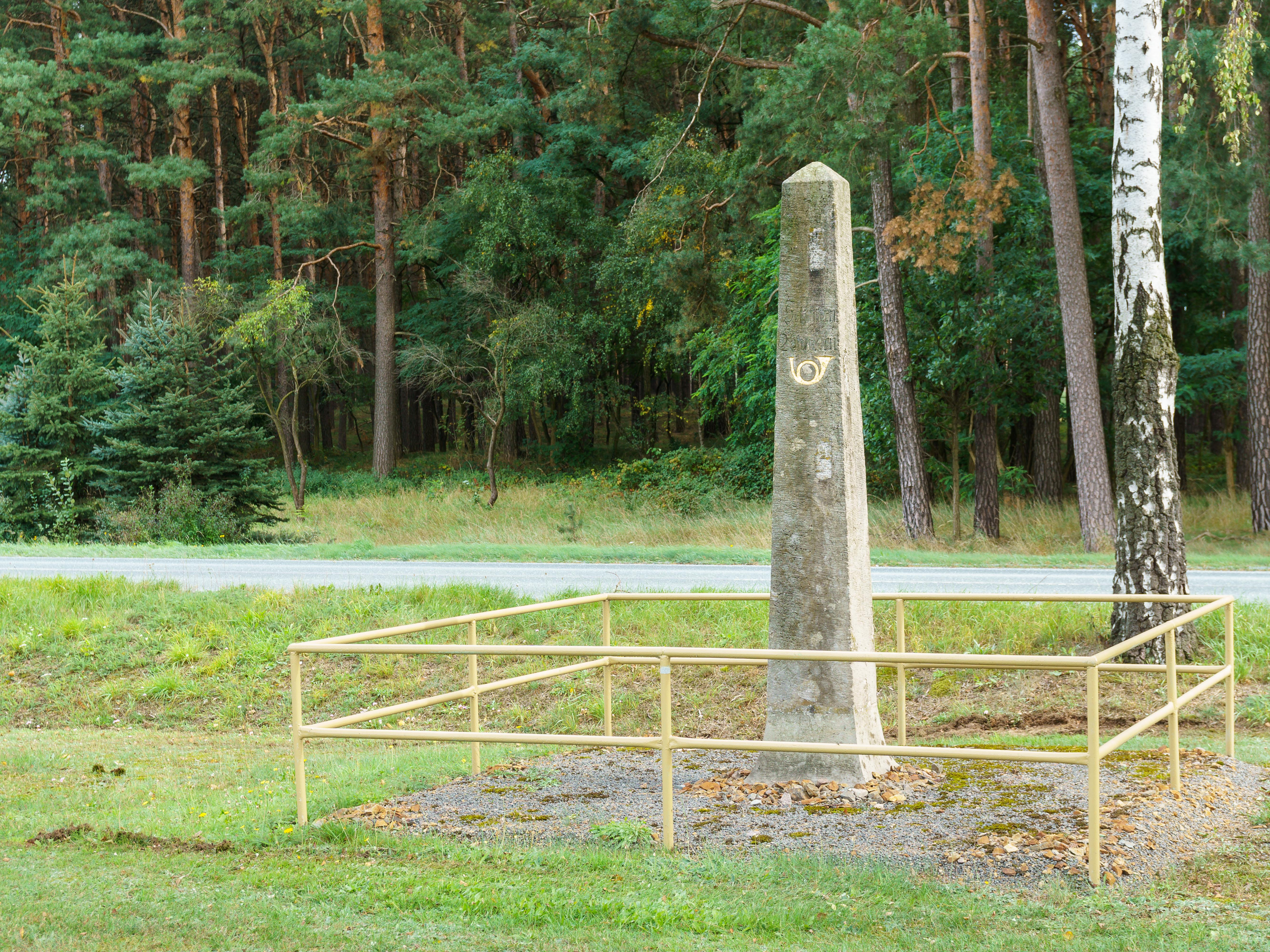 Kursächsische Postmeilensäule-Ganzmeilensäule Nr. 44, Schliebener Straße / B87 in Hohenbucko. Text: Luckau 4 Stundn ; Schlieben 2 Stunden ; Posthorn